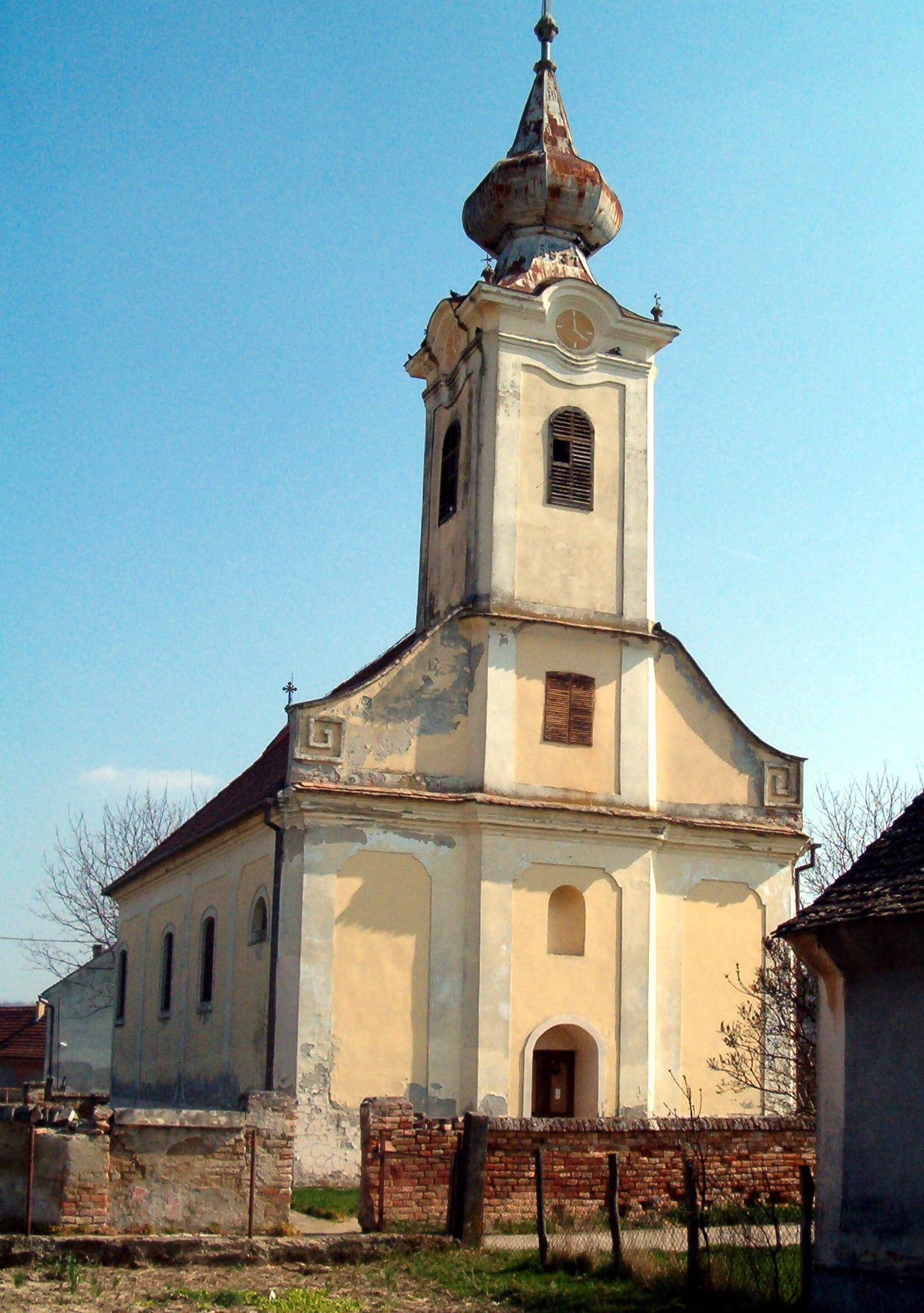 A kép a baranyabáni ortodox templomot ábrázolja nyugatról.